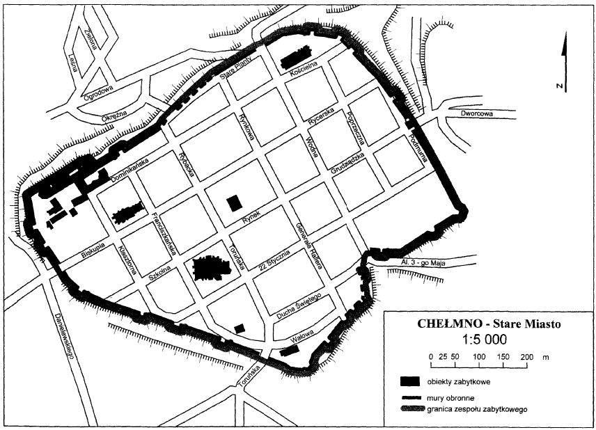 Mapa Chełmna - granice Starego Miasta uznanego za pomnik historii.